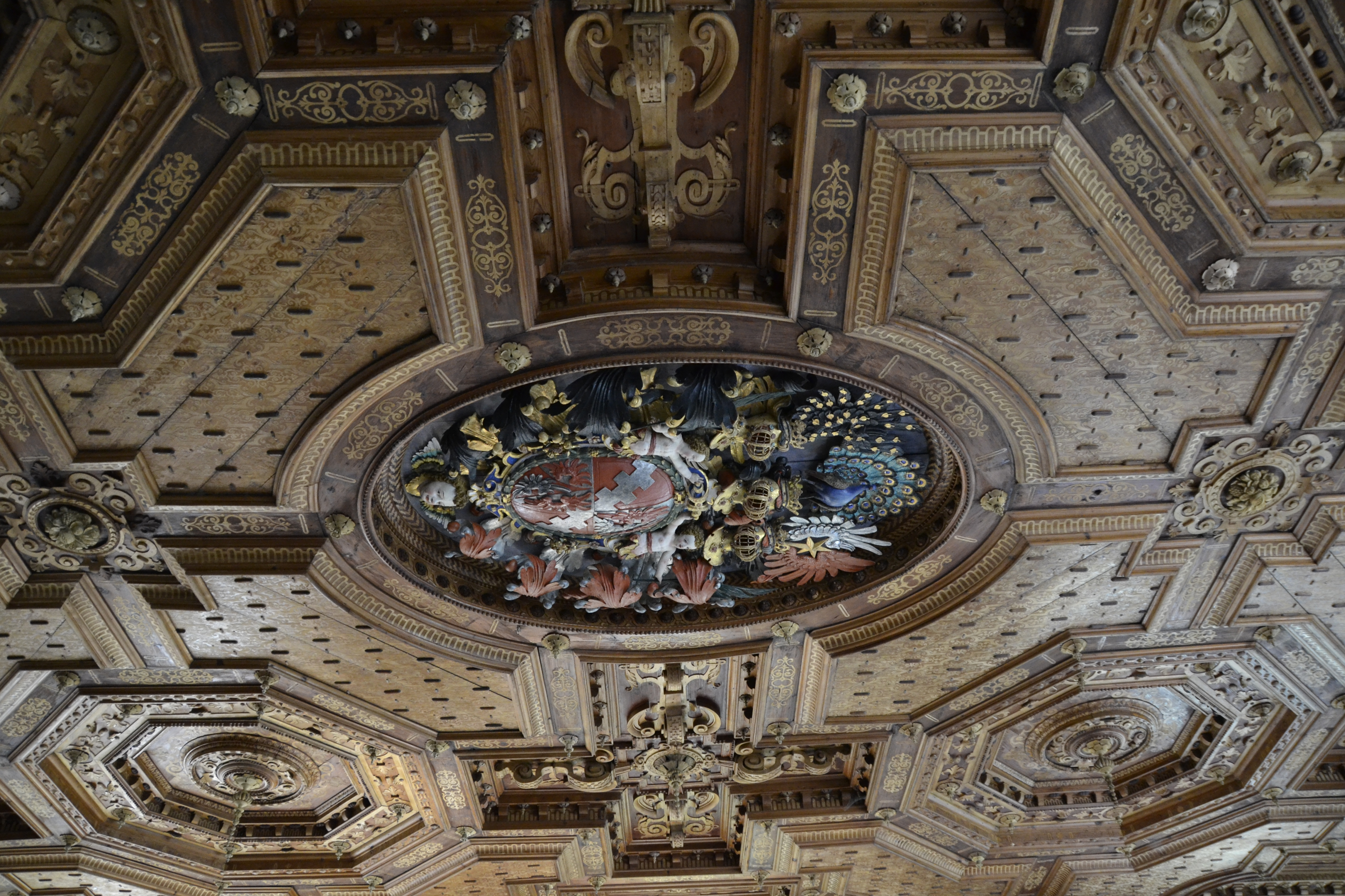 Ausschnitt aus der prunkvollen Renaissance-Holzkassettendecke der Schlosskapelle im Schloss Ortenburg.